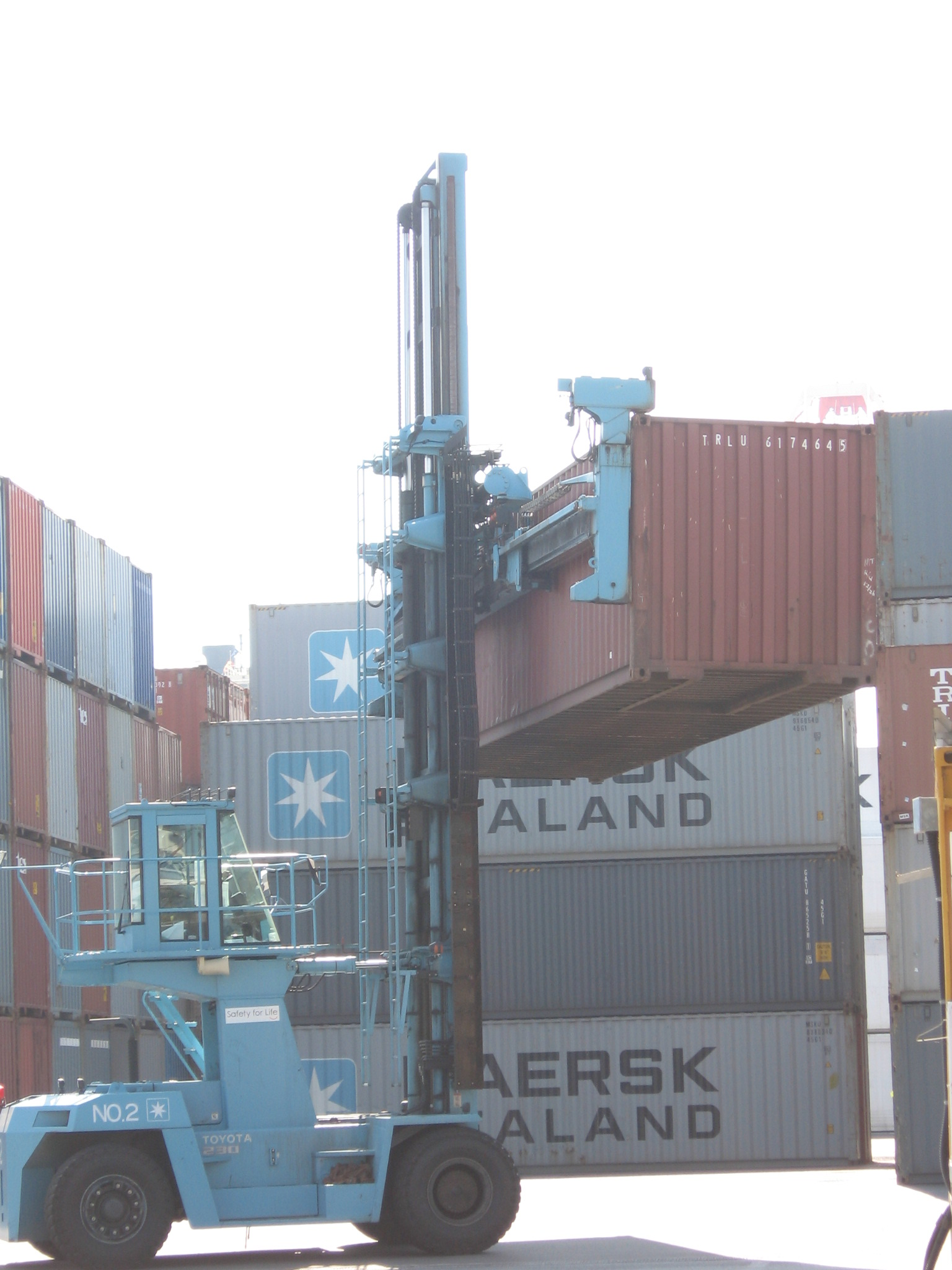 コンテナ関連資料。